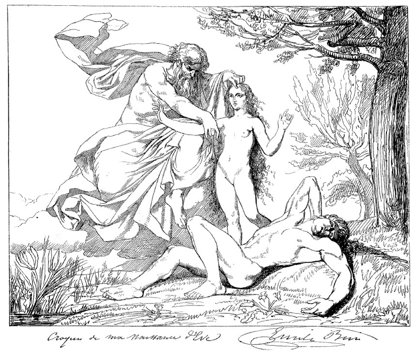 "Croquis de ma Naissance d’Ève - Émile Bin".